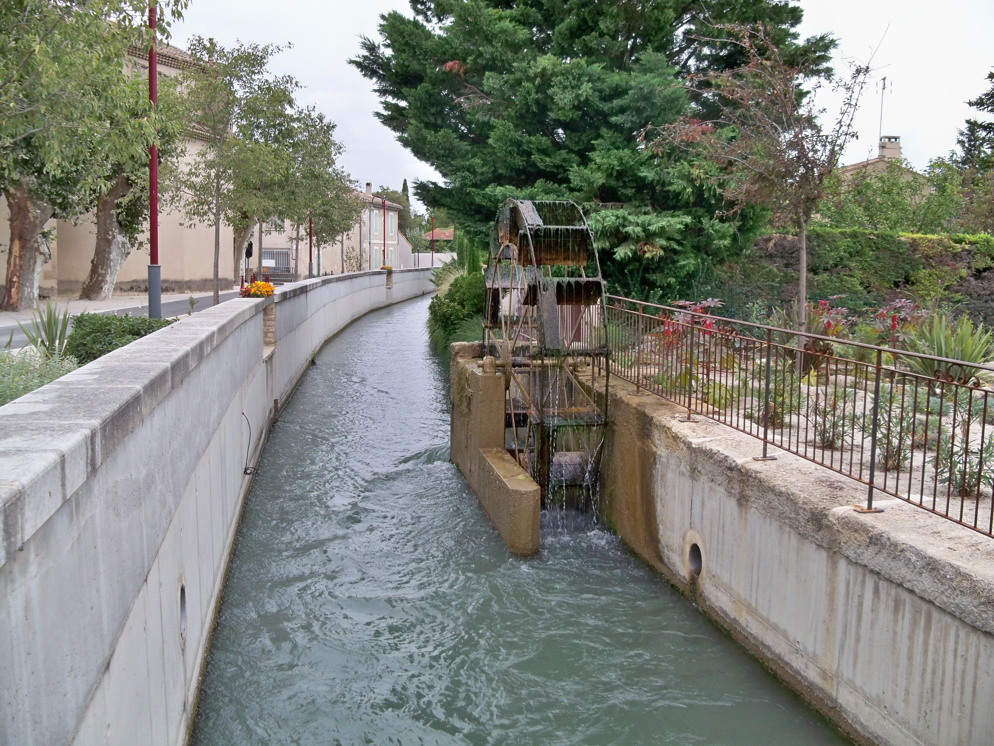 roue à aubes sur le canal Saint Julien, à Cheval-Blanc, Vaucluse, France